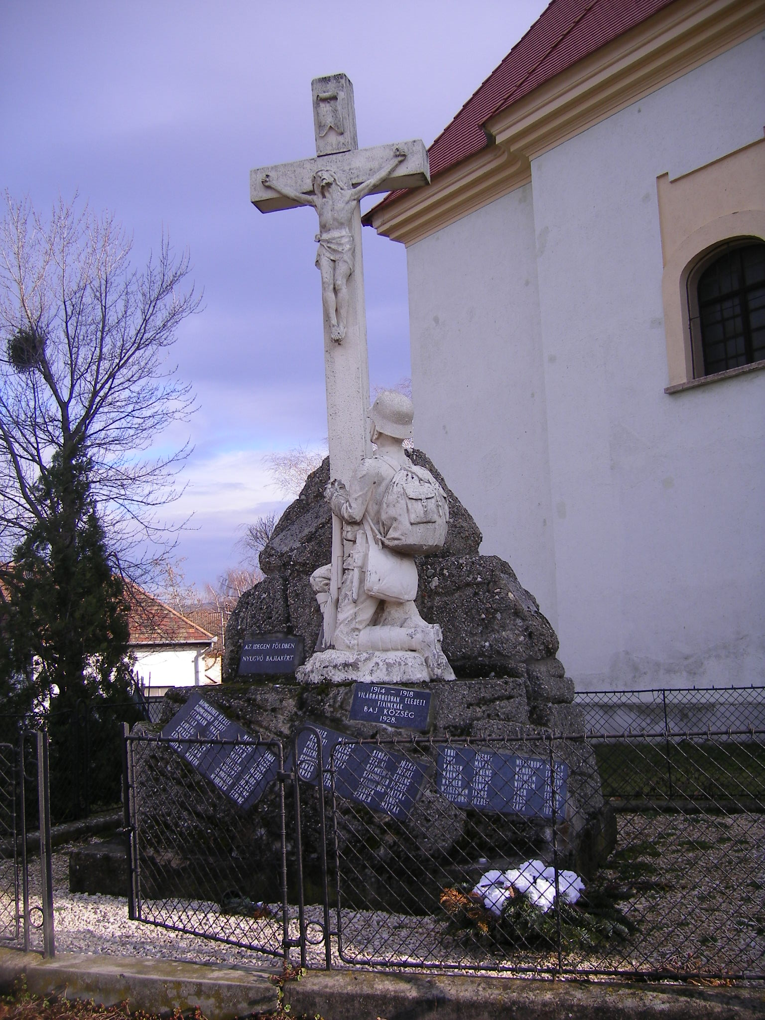 Baj - első világháborús emlékmű